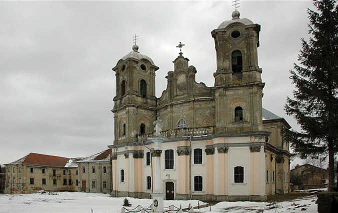 Церква Непорочного Зачаття Пречистої Діви Марії: фото